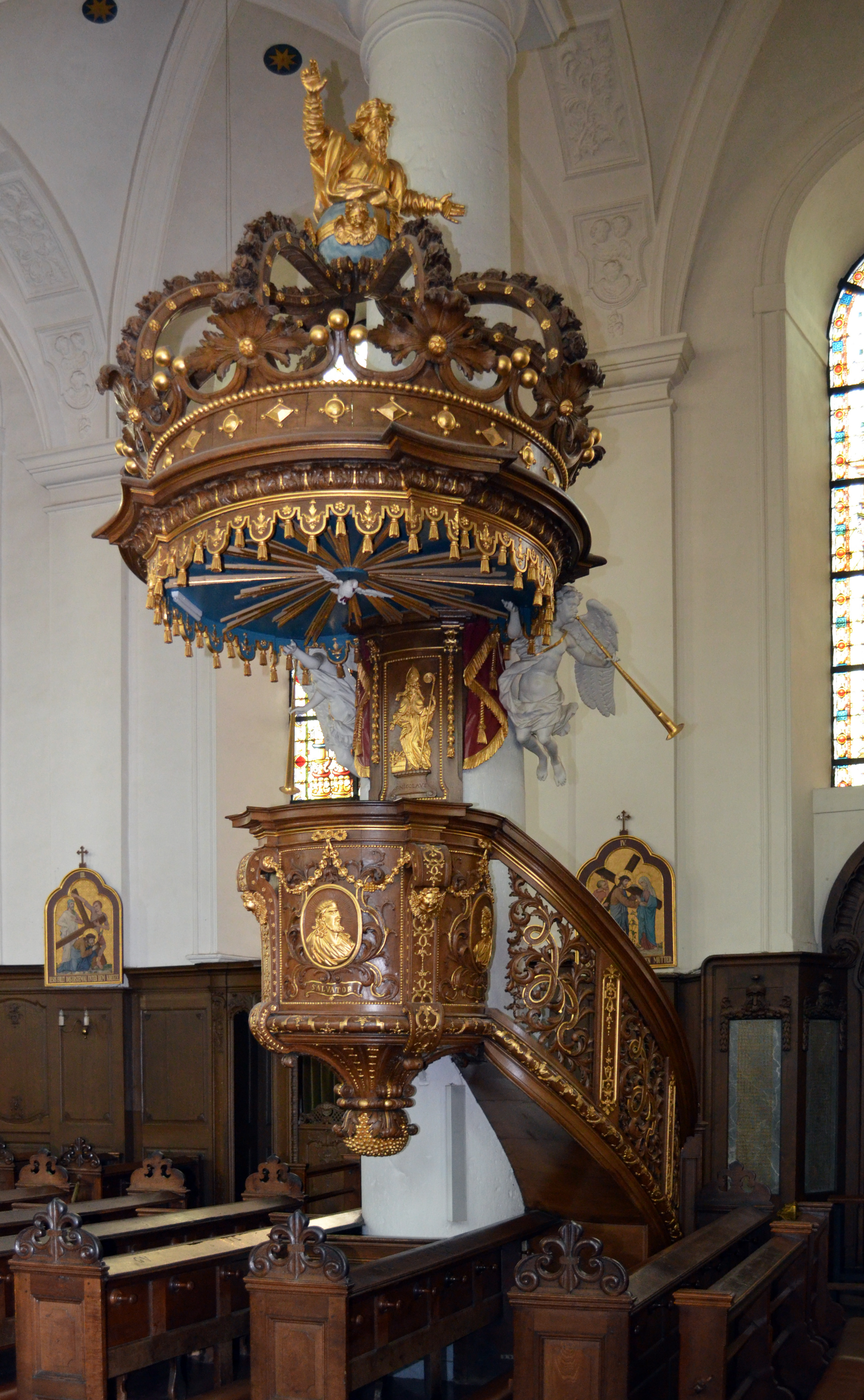 Kirche St. Nikolaus in Eupen, Kanzel